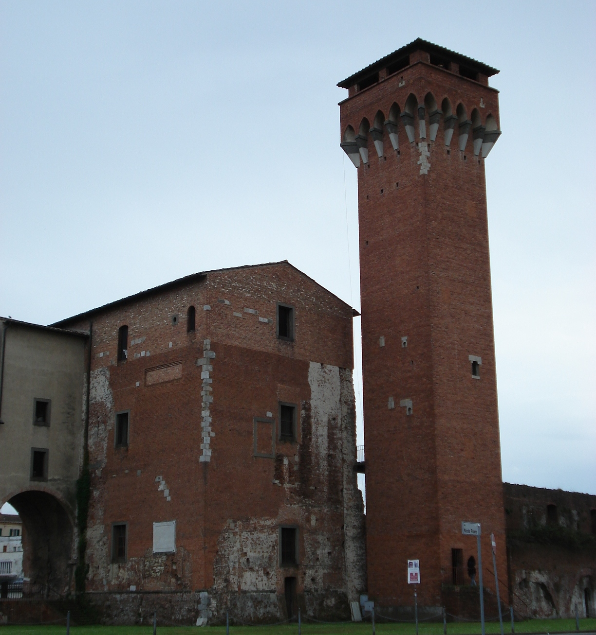 Pisa: Cittadella